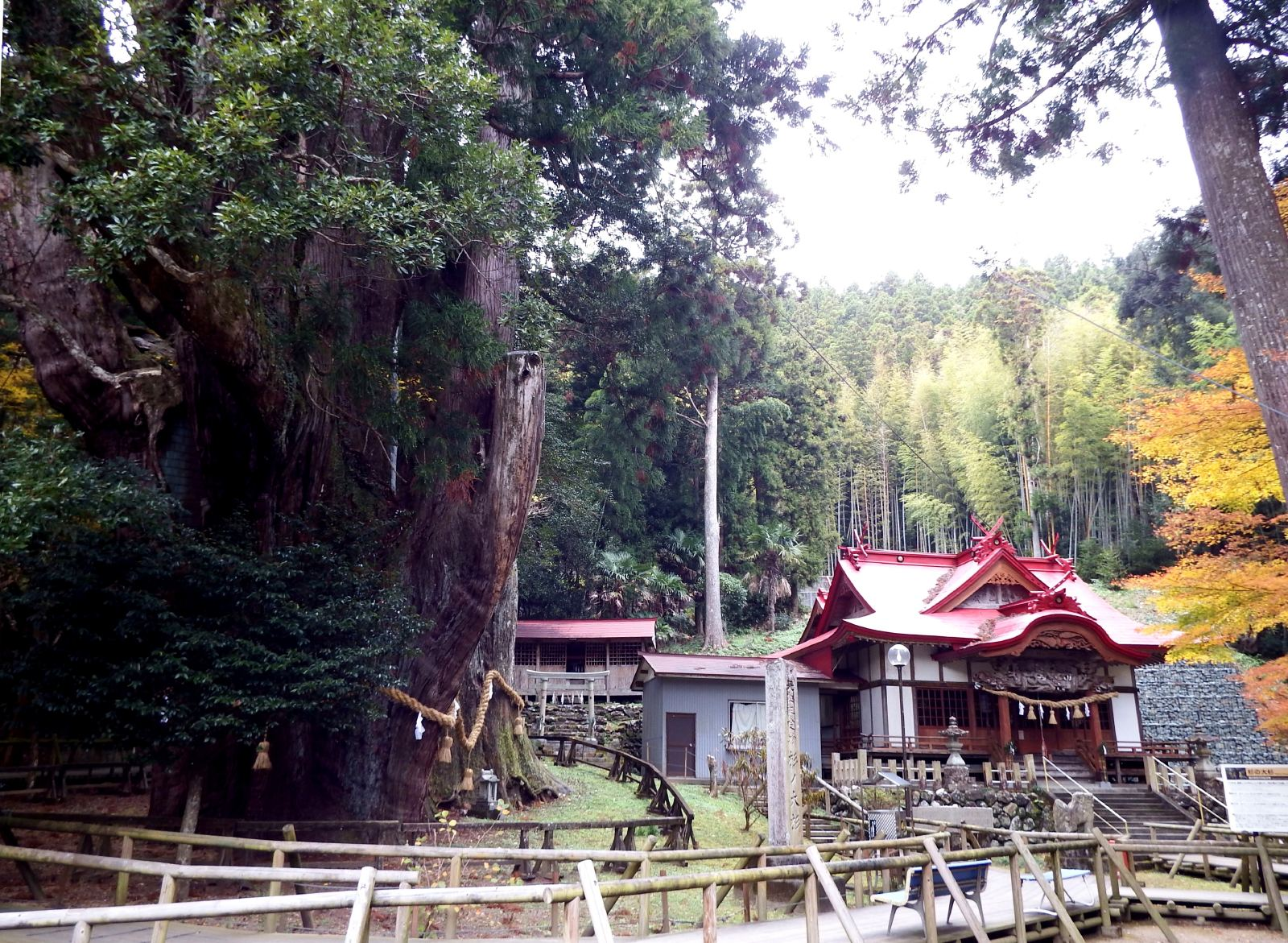 大杉と八坂神社